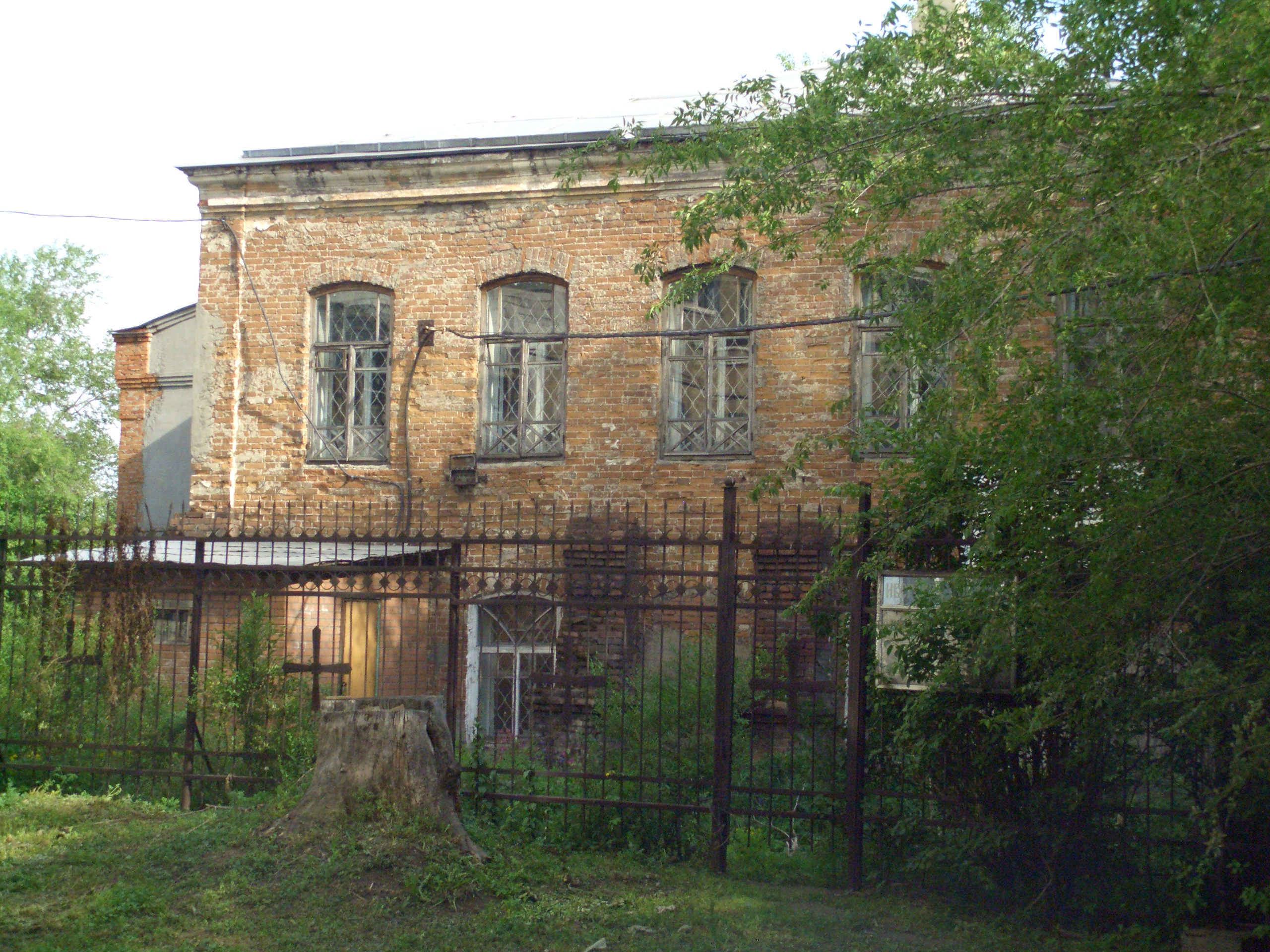 Здание окружного суда (затем акционерного общества Копикуз): улица Народная, 5а, Новокузнецк, Кемеровская область